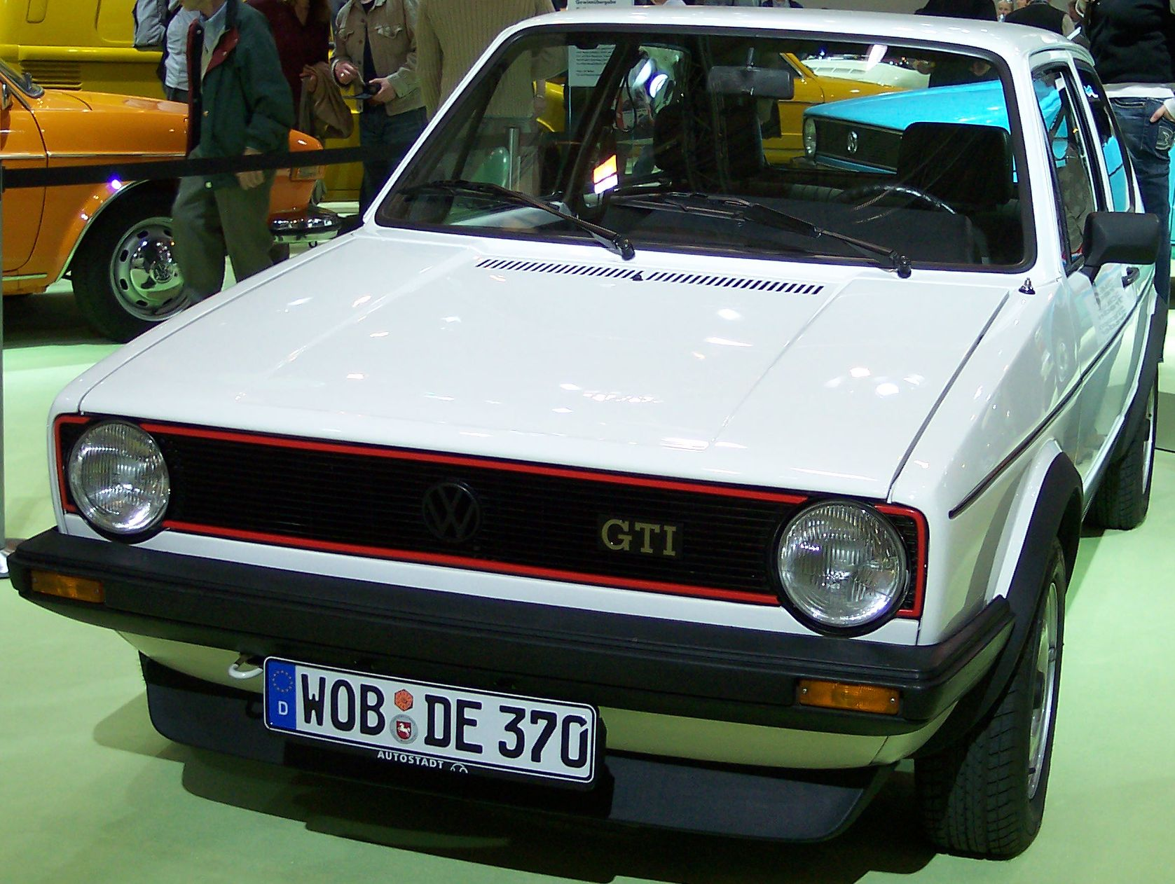 VW Golf I GTI designed by Giorgetto Giugiaro